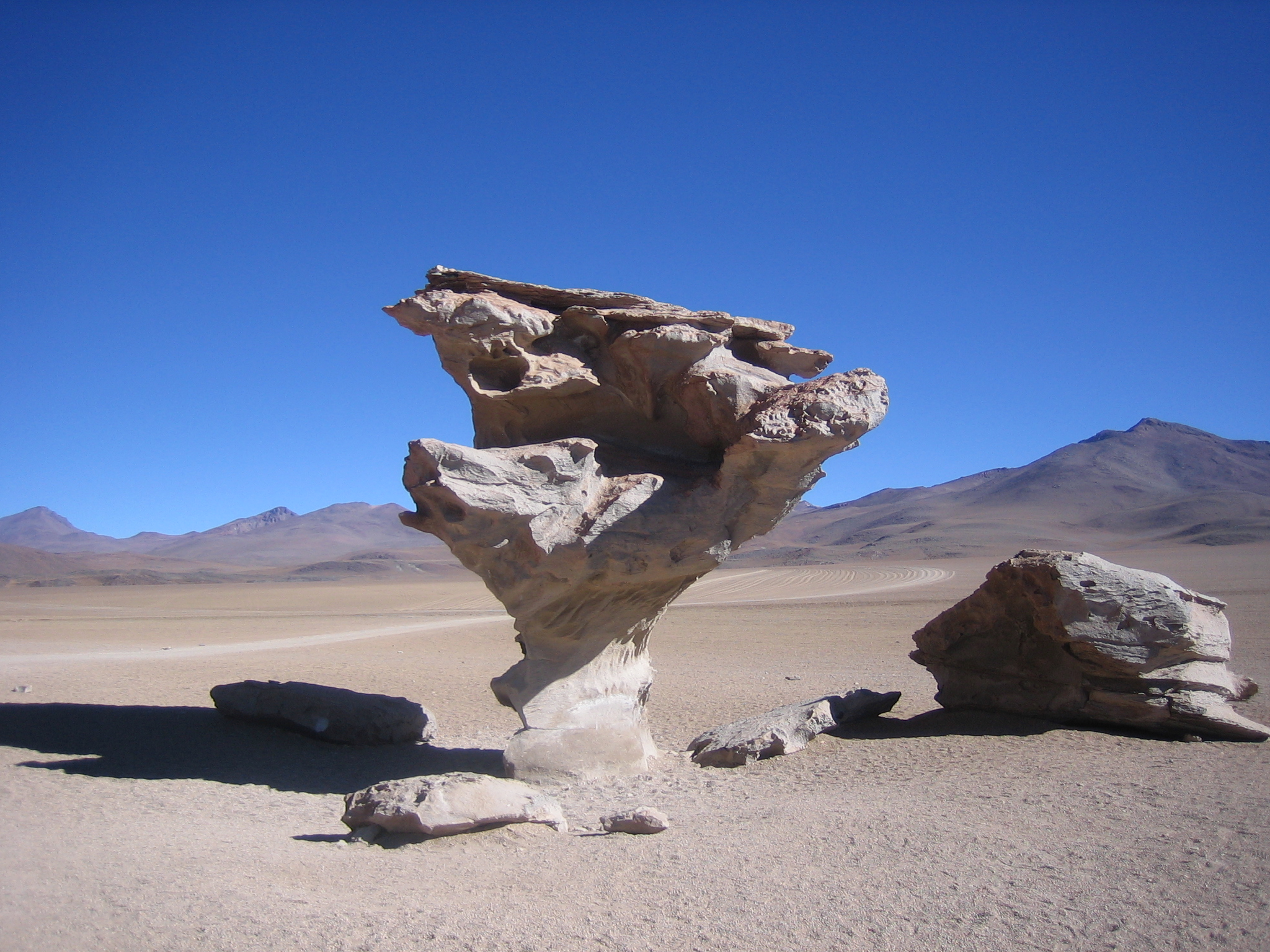 Desert Siloli, Bolivia